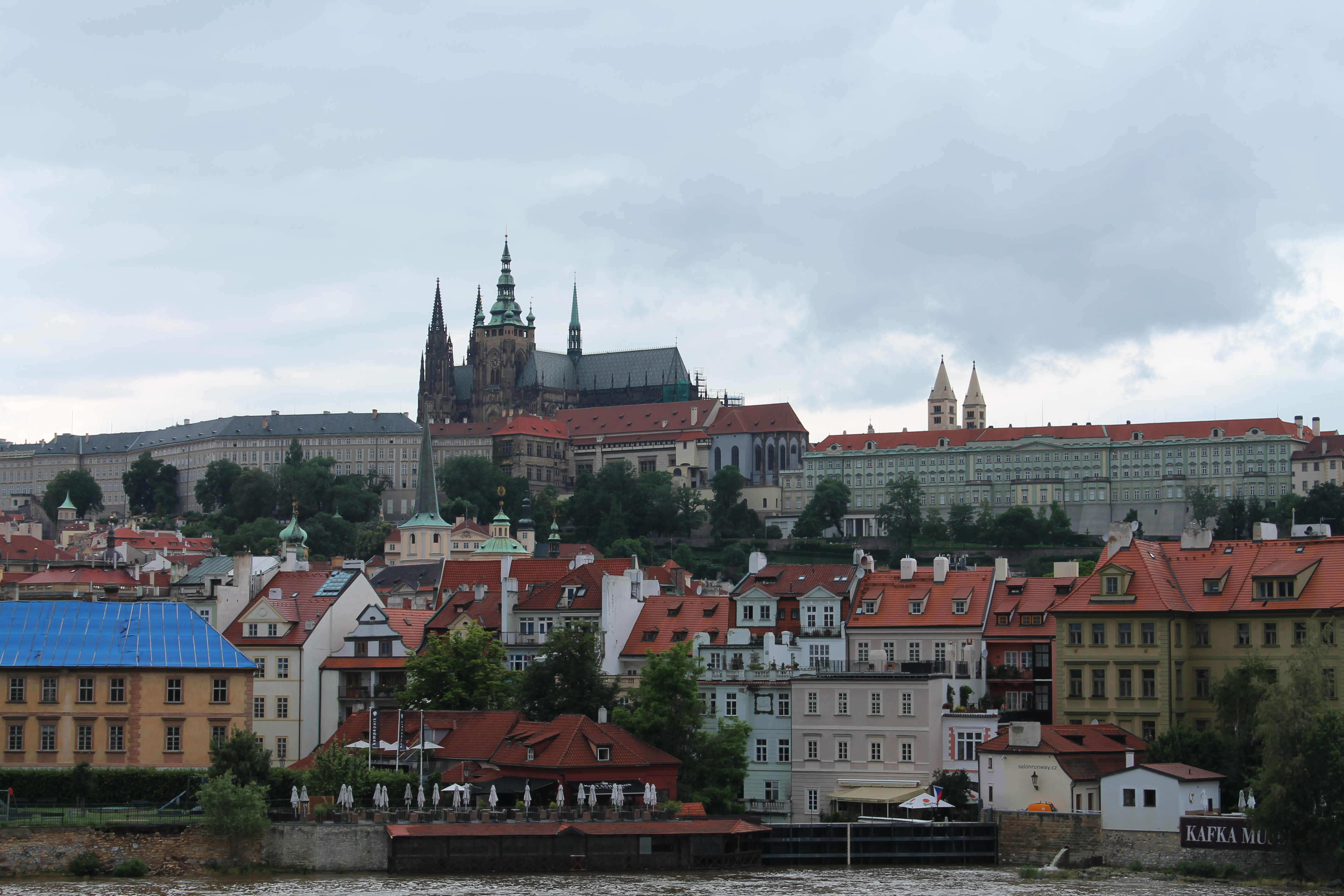 Karlův most, Staré Město a Malá Strana, mezi Křižovnickým náměstím a Mosteckou